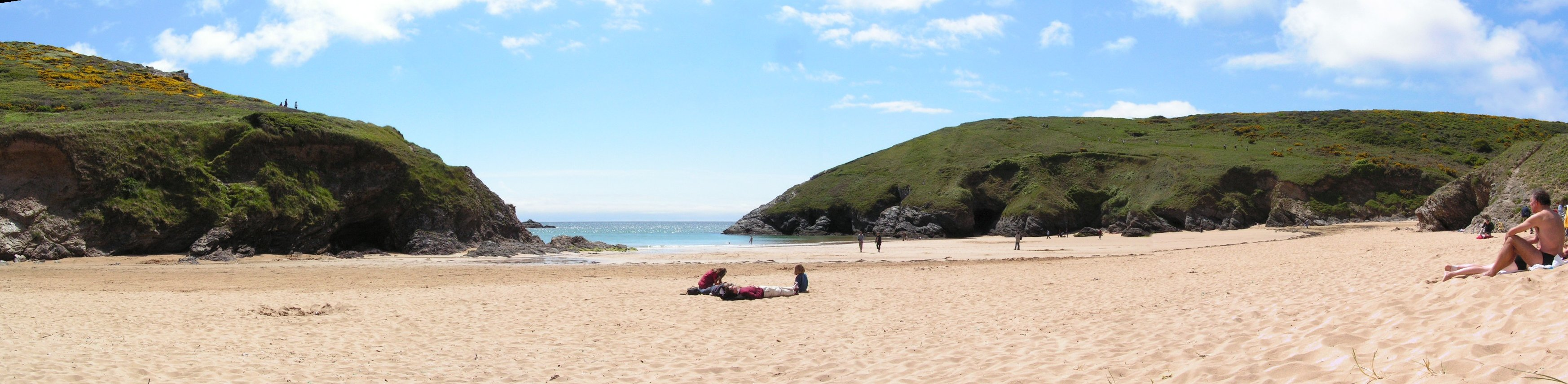 Plage de Herlin Belle Isle en Mer Morbihan